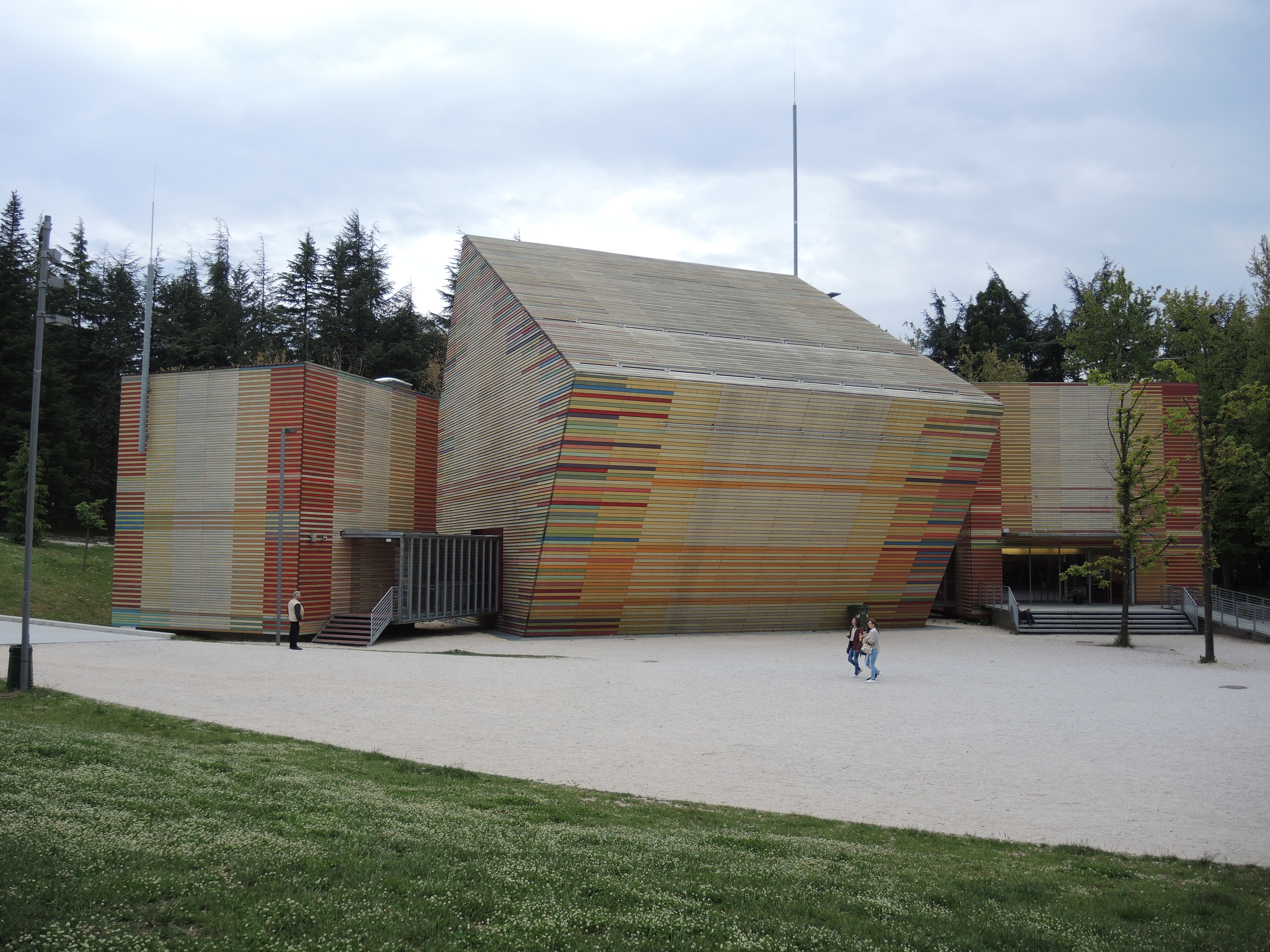 L'Aquila: Auditorium del Parco